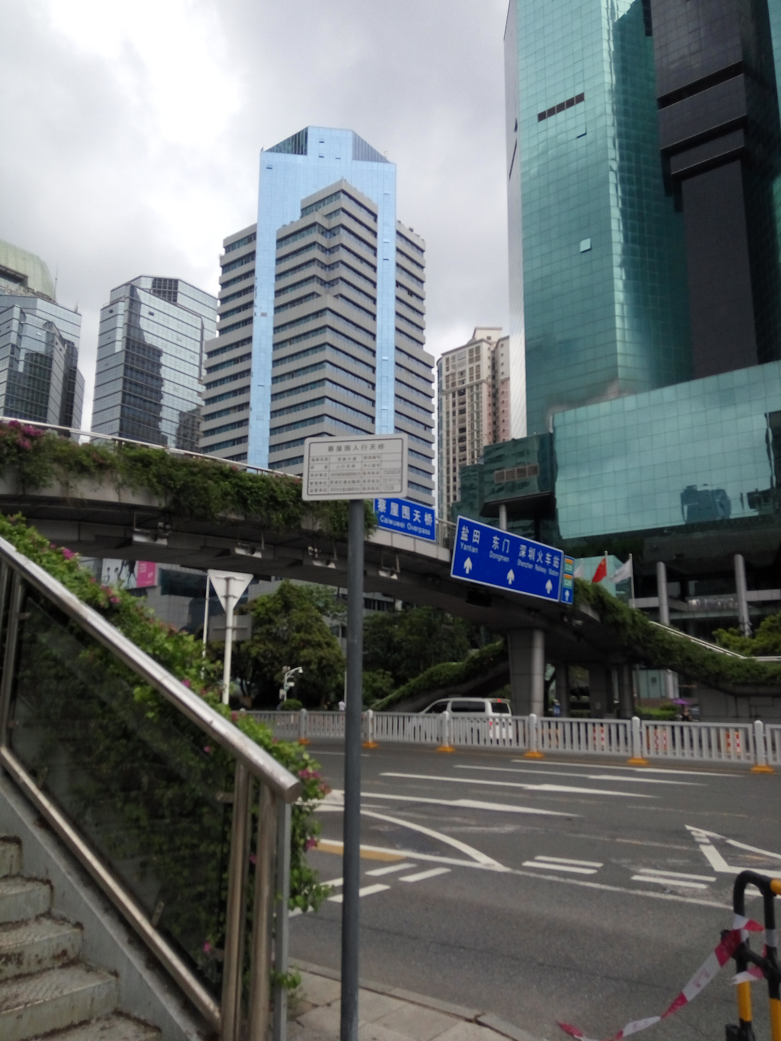 深南东路及深圳书城罗湖店